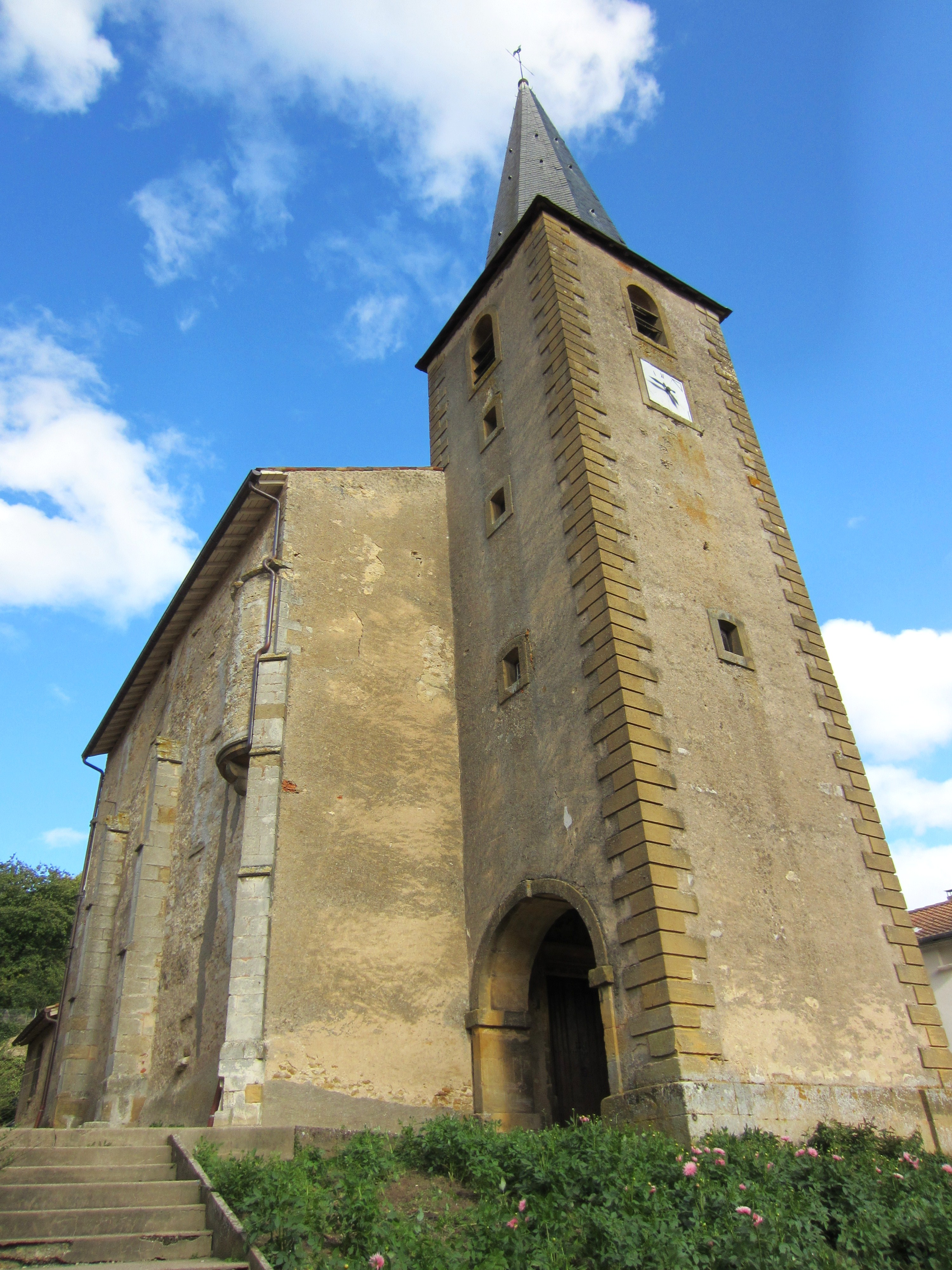 Description eglise Waville eglise Waville